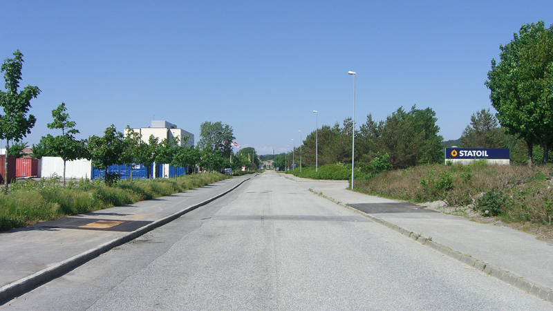 Svanholmen in Sandnes and Stavanger, Norway